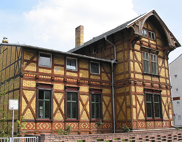 Rayonhaus